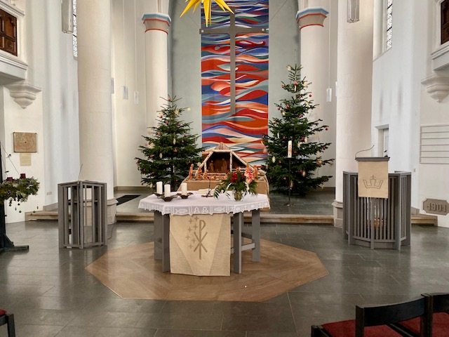 Blick in den Altarraum, Christuskirche Hamm